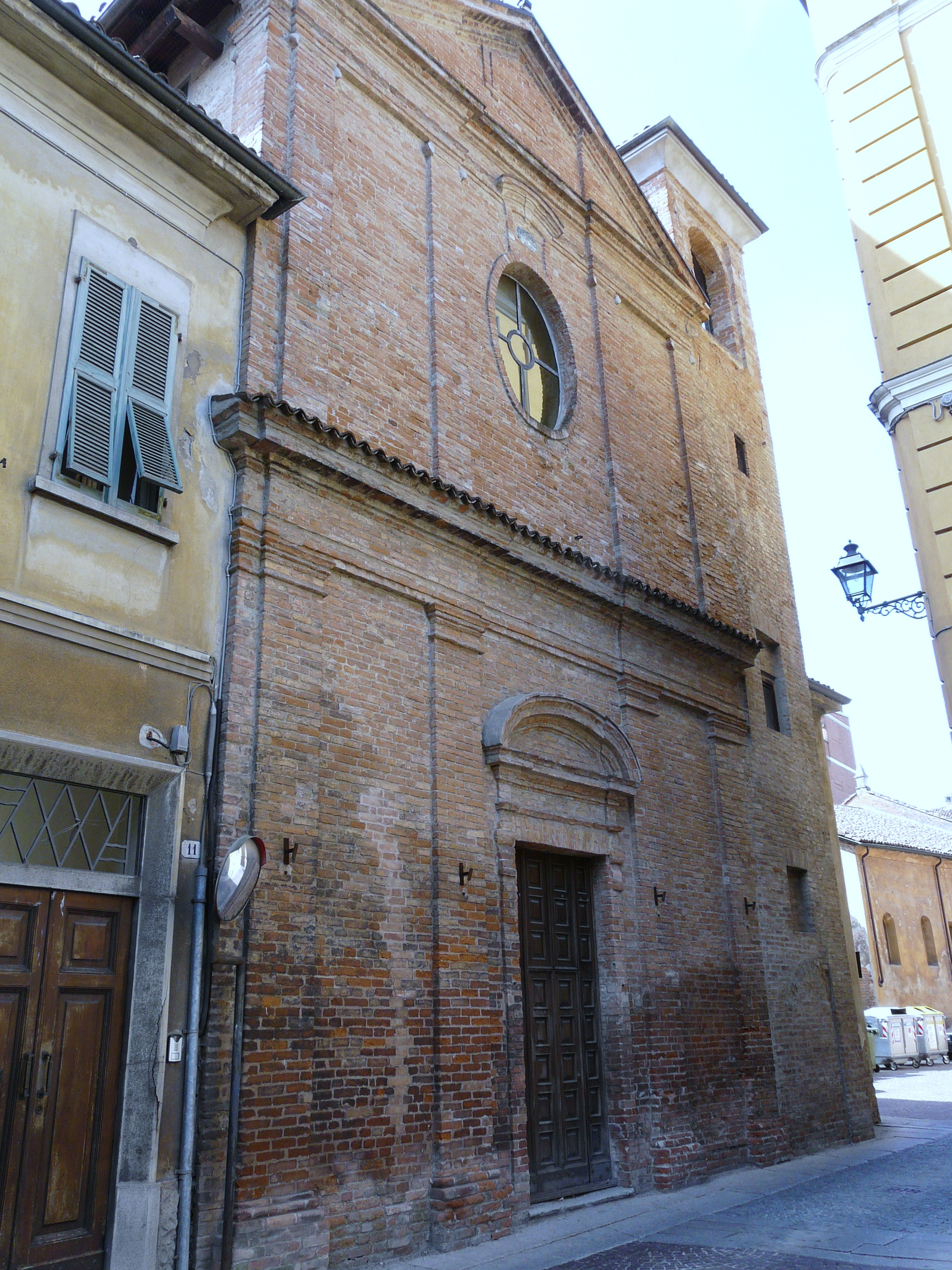 Chiesa o oratorio nei pressi di via Montemerlo, Tortona, Piemonte, Italia